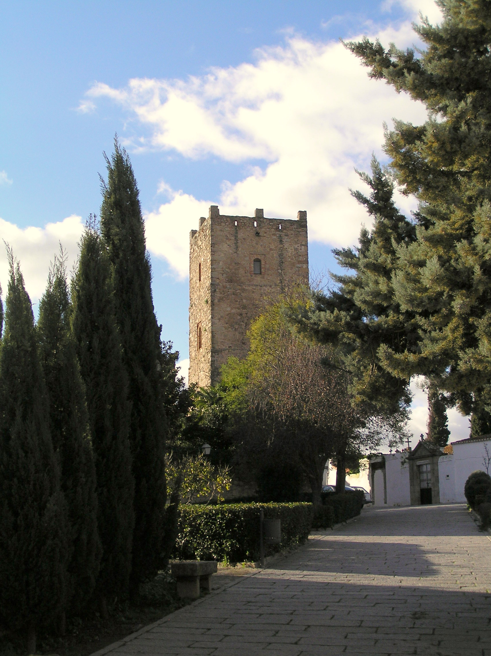 Torre del Alcázar de los Bejarano, en Trujillo